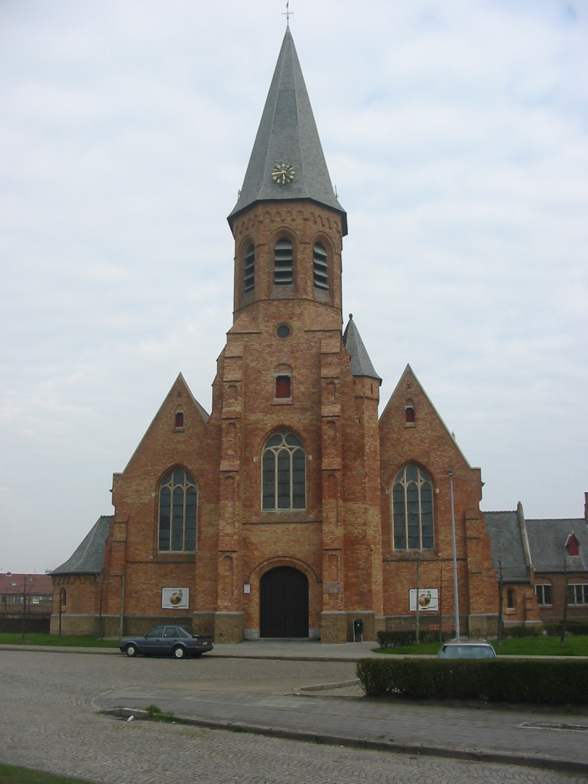 Belgium, Zeebrugge, Church